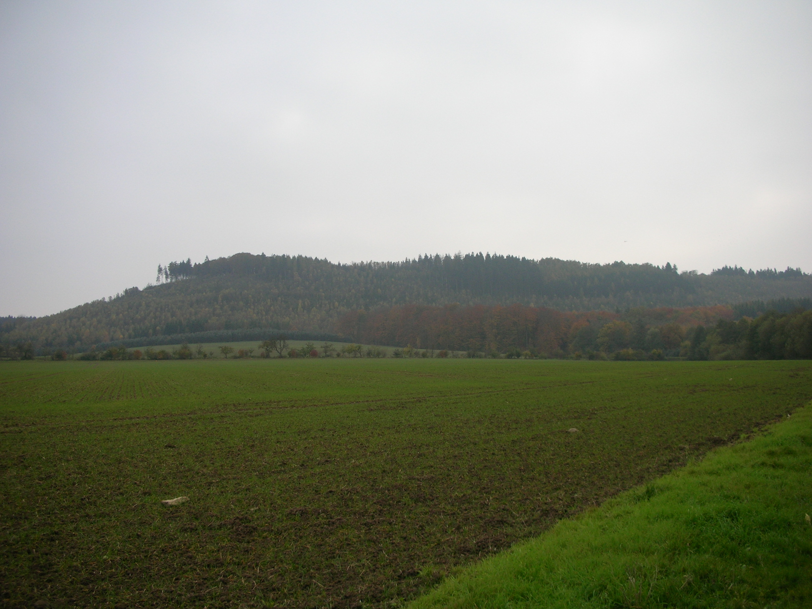 Tönsberglager im Osning